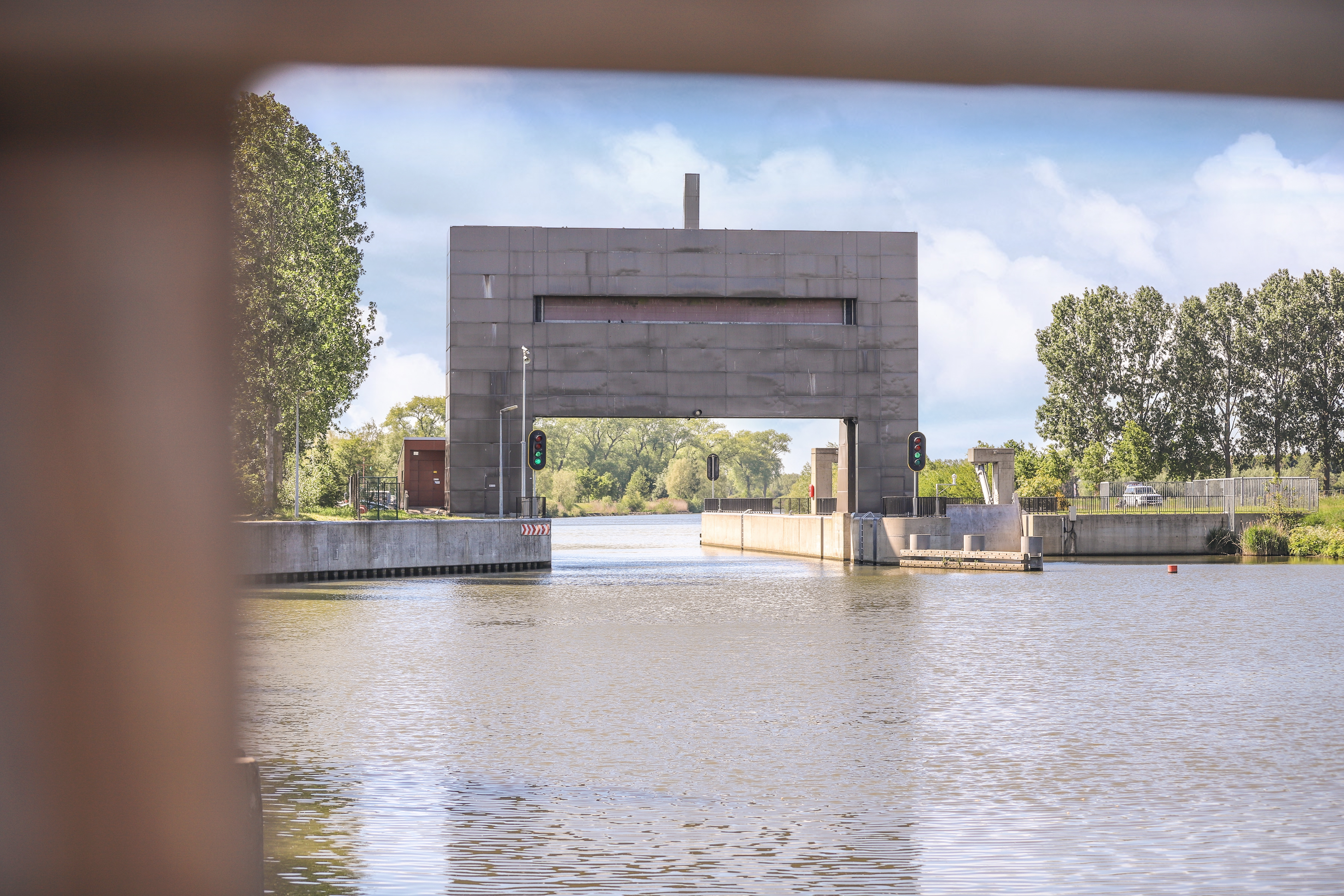 Keersluis van Beernem in 2020. Ontworpen van Hans Vandeweghe. Opgenomen als erfgoed in 2009.